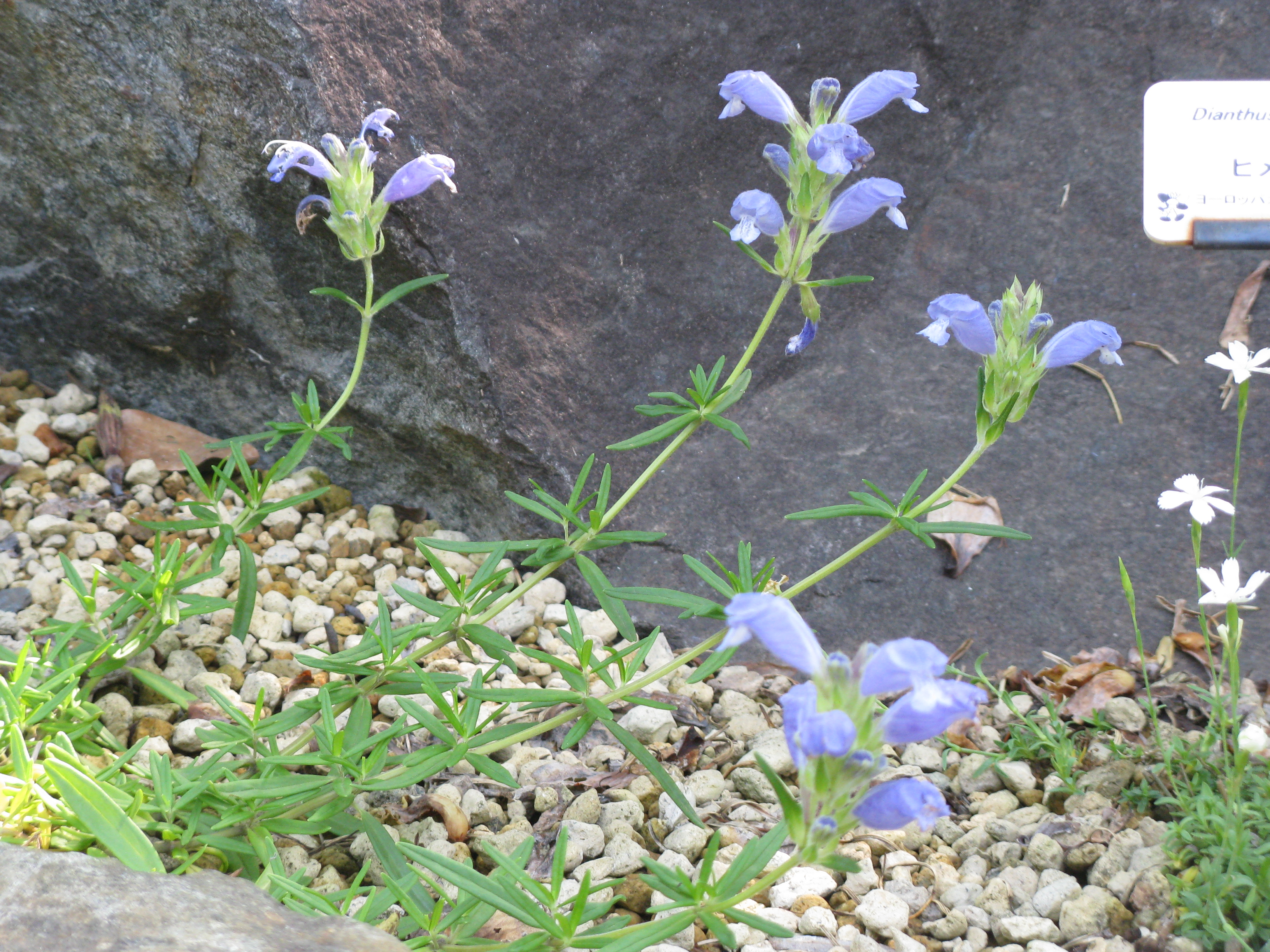 Dracocephalum argunense